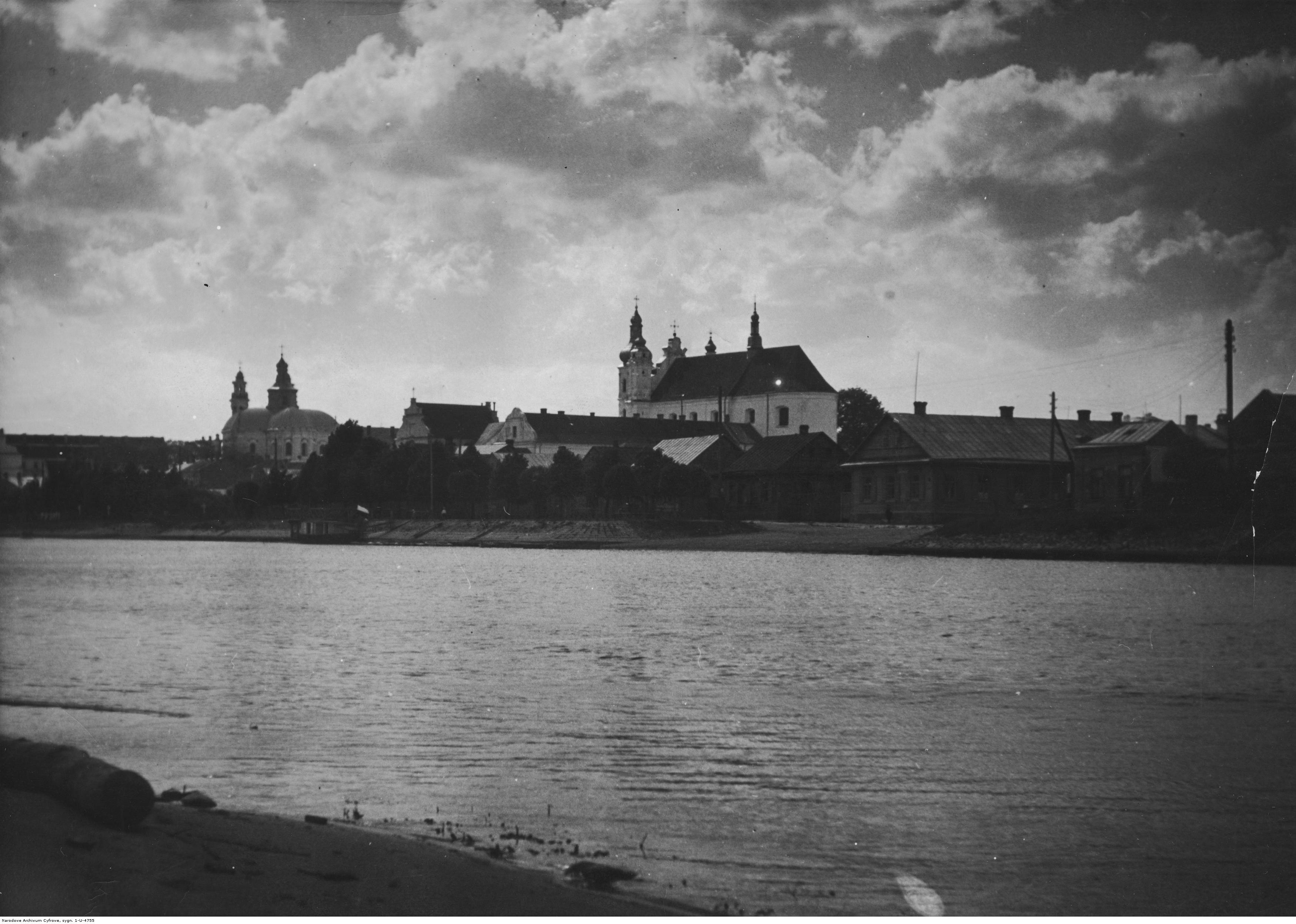 Panorama Pińska od strony rzeki Piny z widocznym kościołem Wniebowzięcia Najświętszej Maryi Panny. Koncern Ilustrowany Kurier Codzienny - Archiwum Ilustracji. Sygnatura: 1-U-4755